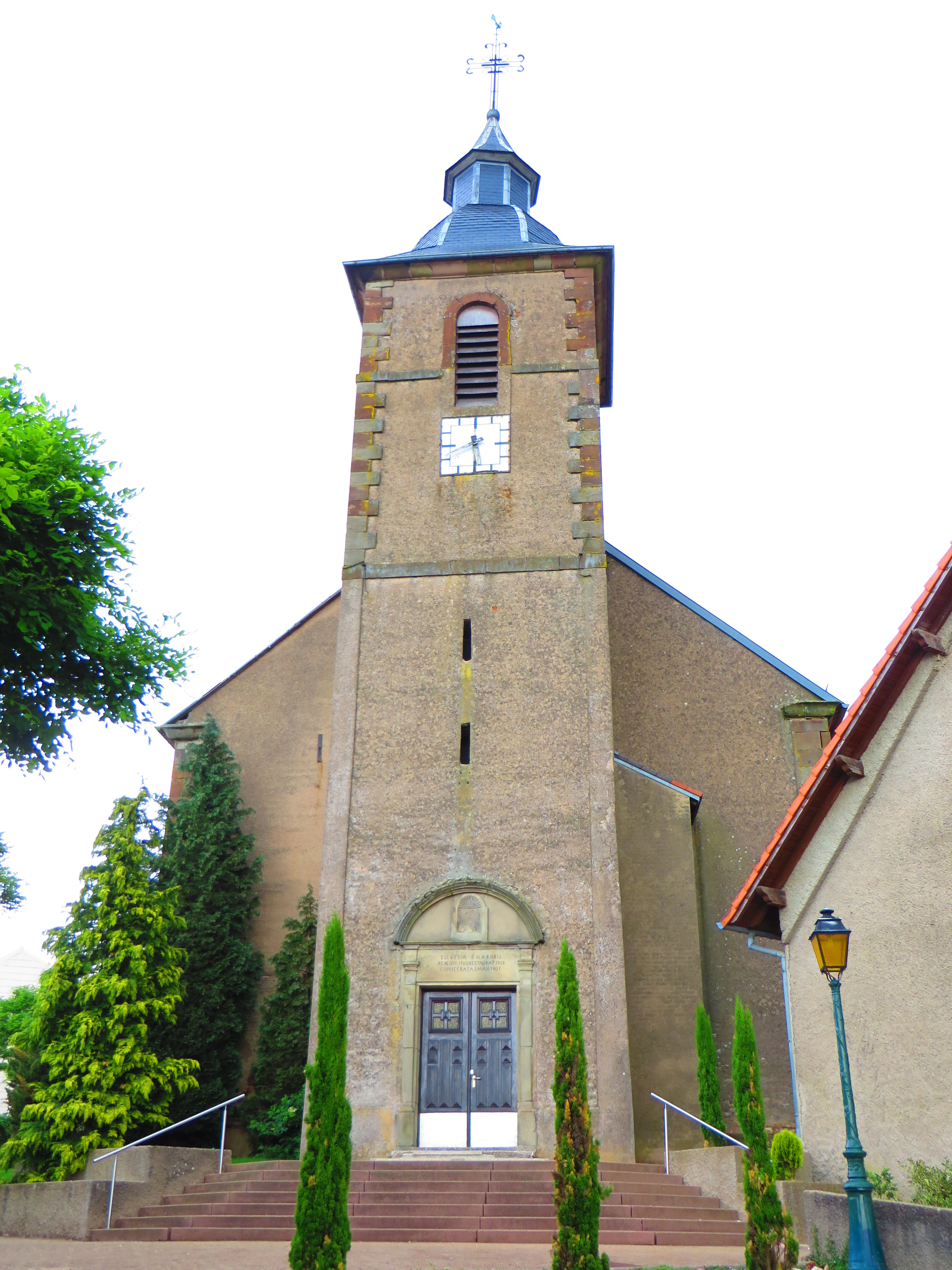 Nousseviller-Saint-Nabor Église Saint-Nabord